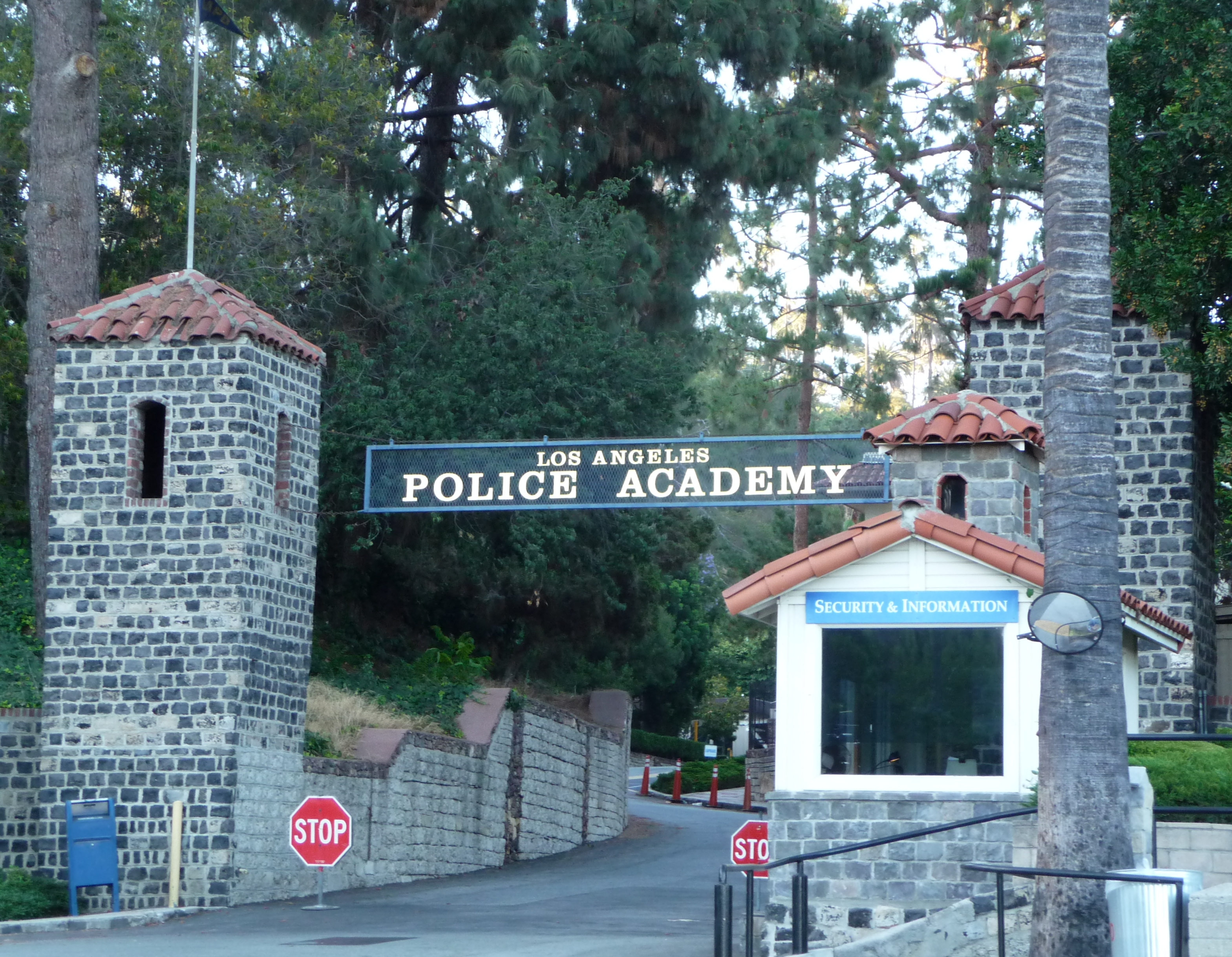 Los Angeles - Historic LAPD Academy entrance